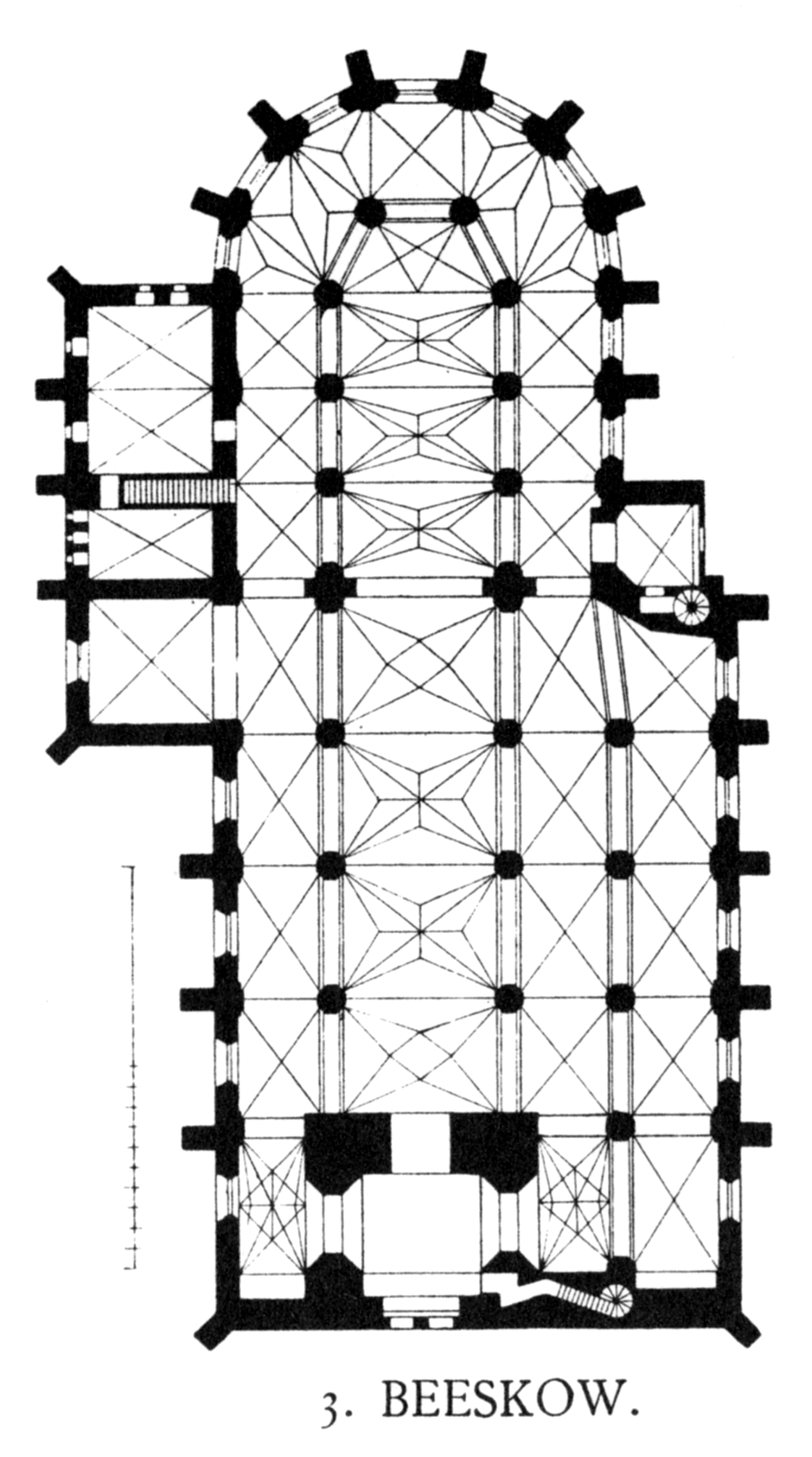 Beeskow